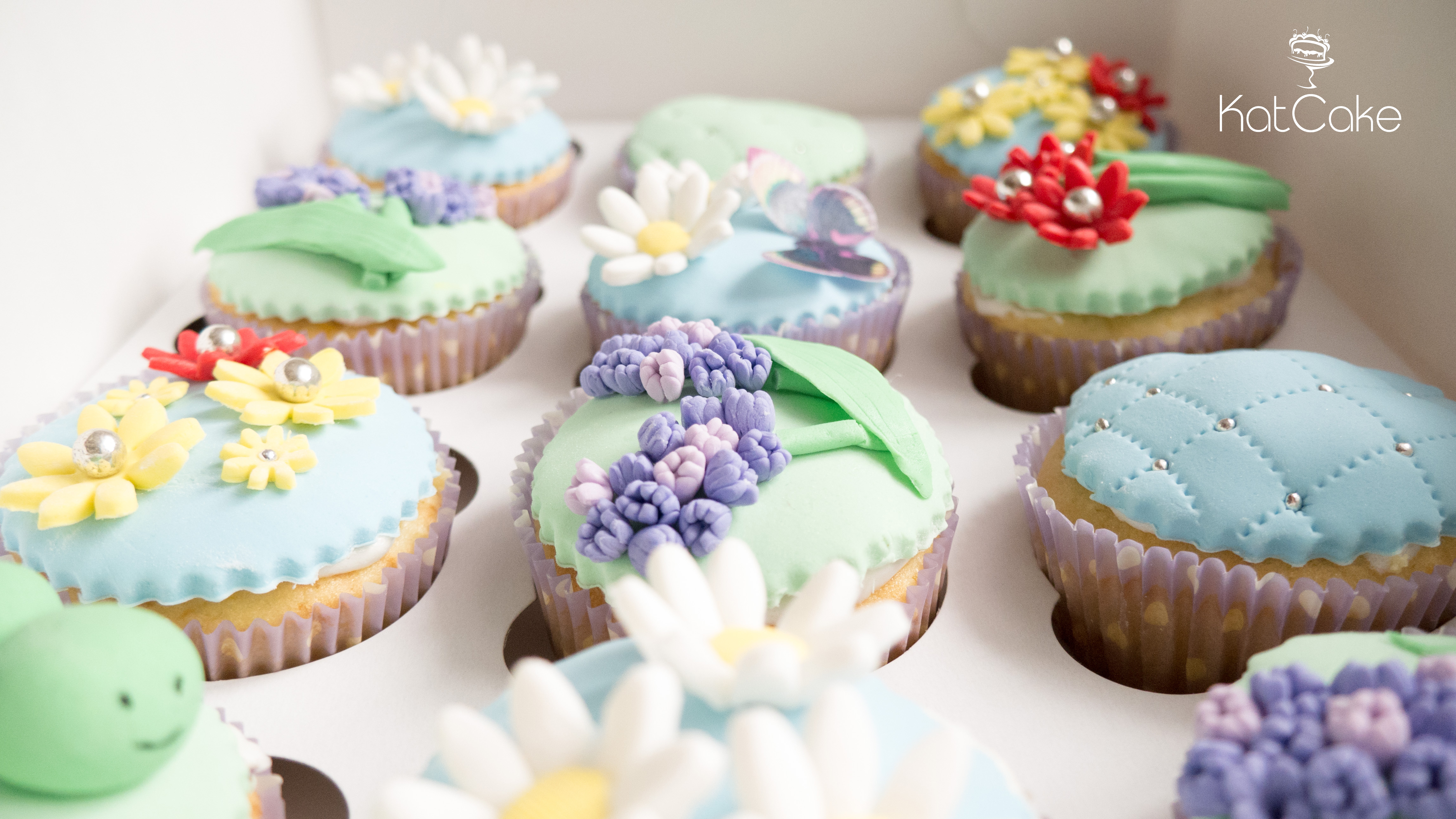 Капкейки украшенные цветами из мастики